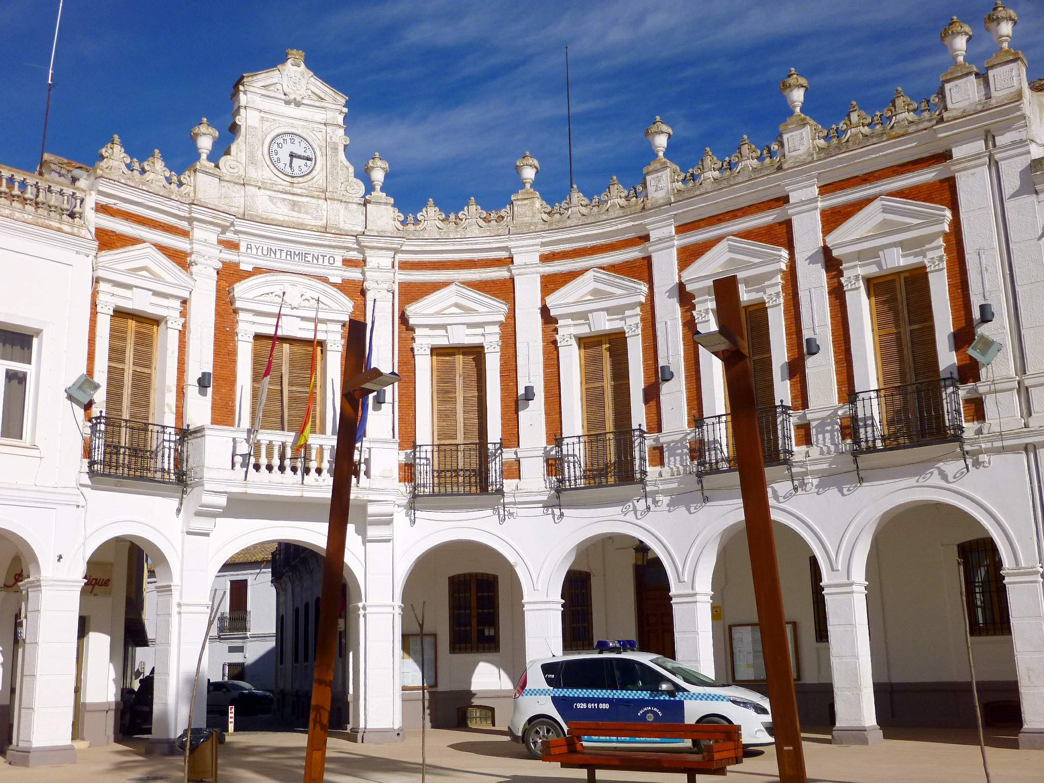 Ayuntamiento de Manzanares (Ciudad Real)